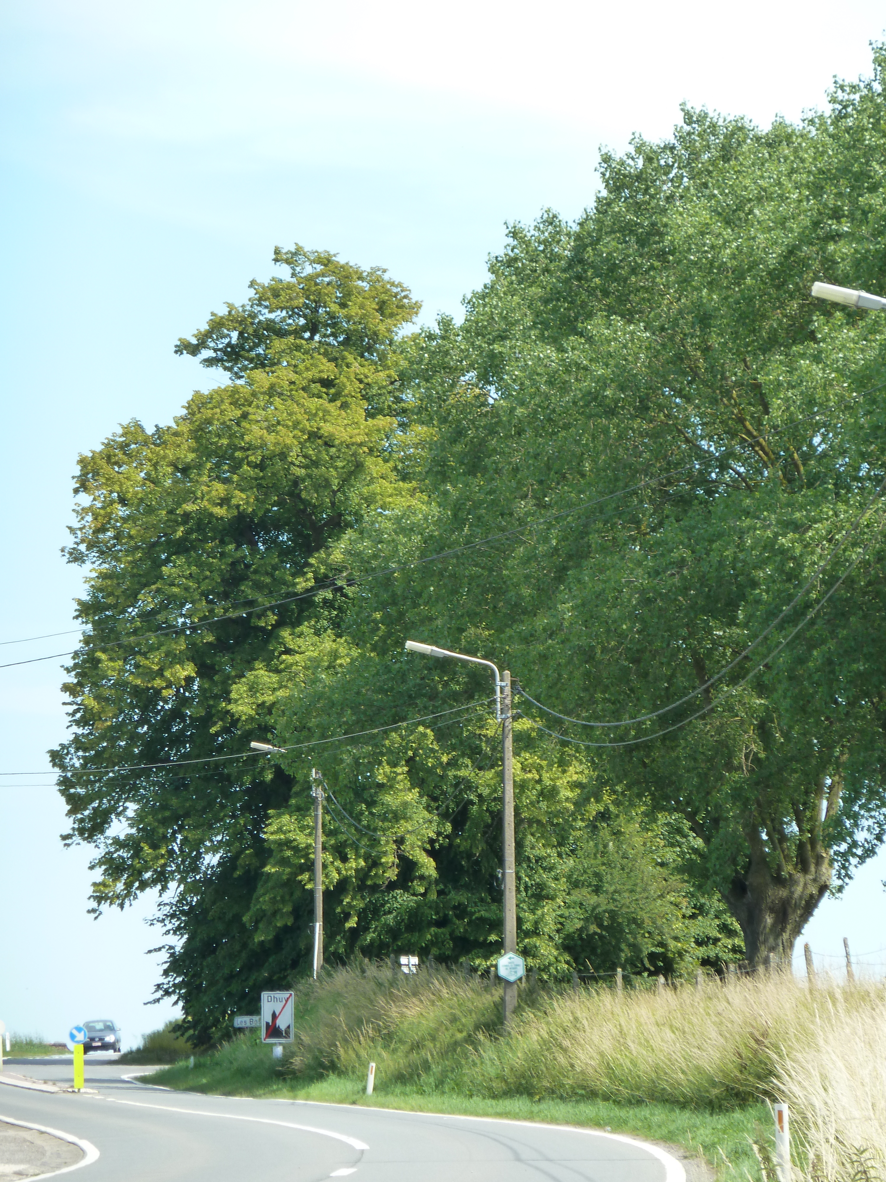 Tumulus aux Six Frères, Dhuy, Éghezée, Belgique